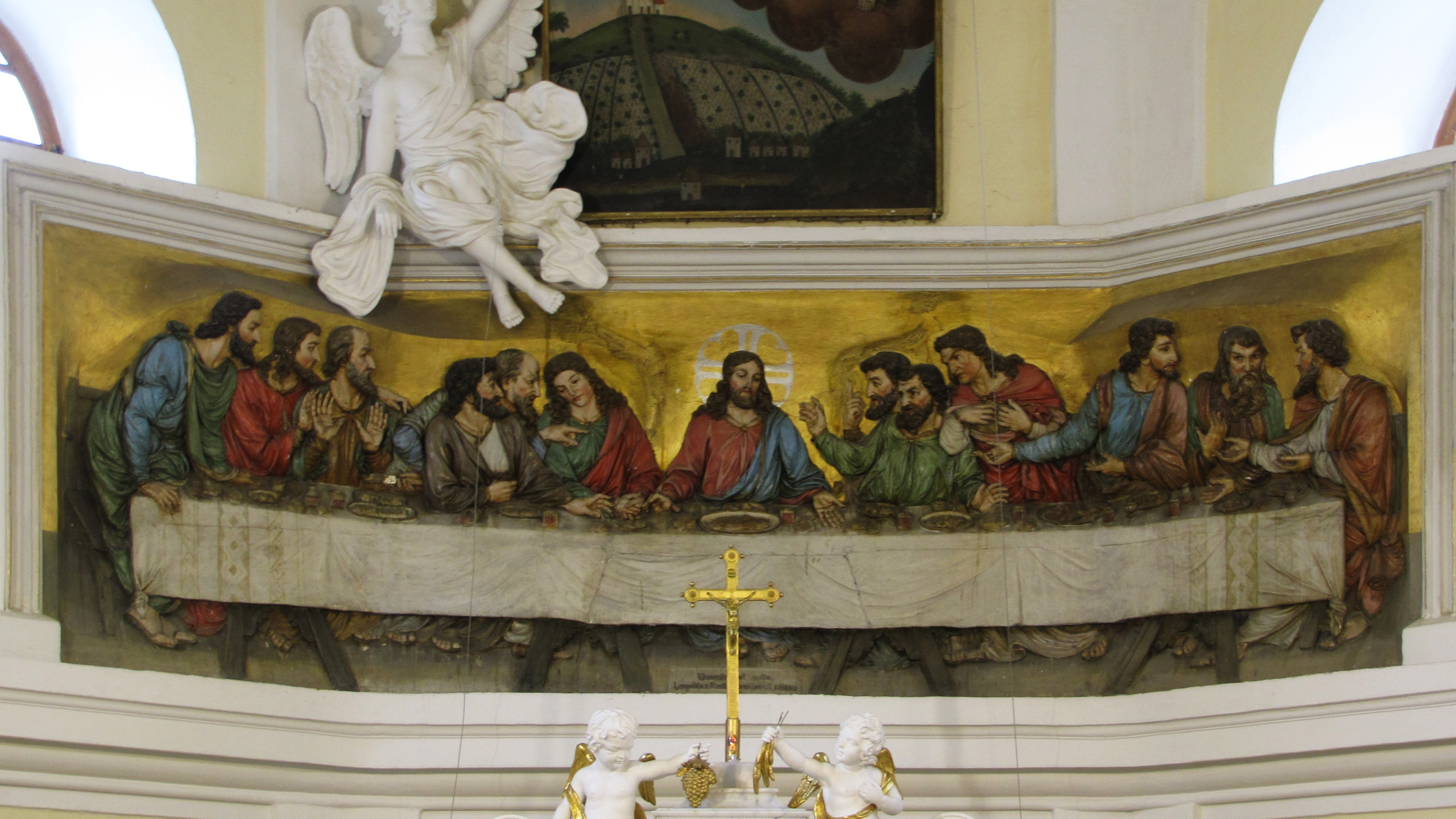 Poutní místo Svatý Antonínek v okrese Hodonín. Plastika Večeře Páně nad hlavním oltářem, kterou v roce 1888 věnoval stavitel Slovák ze Strážnice. Plastika je ze sádry a barevně ji upravil František Hána (1804–1877).